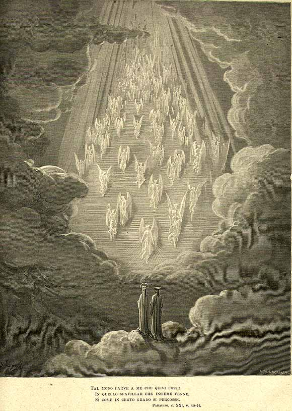 Paradiso by Dante Alighieri Illustration